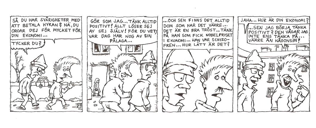 Allan skämtserie publicerad i LO-tidningen 2004. Tecknad av Nisse Lindberg